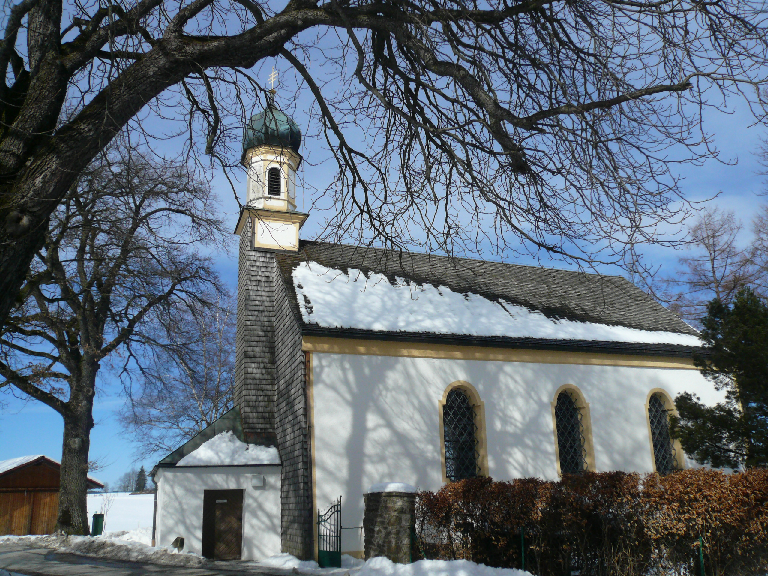 Die im Jahr 1733 errichtete Rochuskapelle in Bad Kohlgrub, Landkreis Garmisch-Partenkirchen. Der Vorgängerbau wurde errichtet aufgrund eines Gelübdes wegen der Pestepidemie im Jahr 1663.